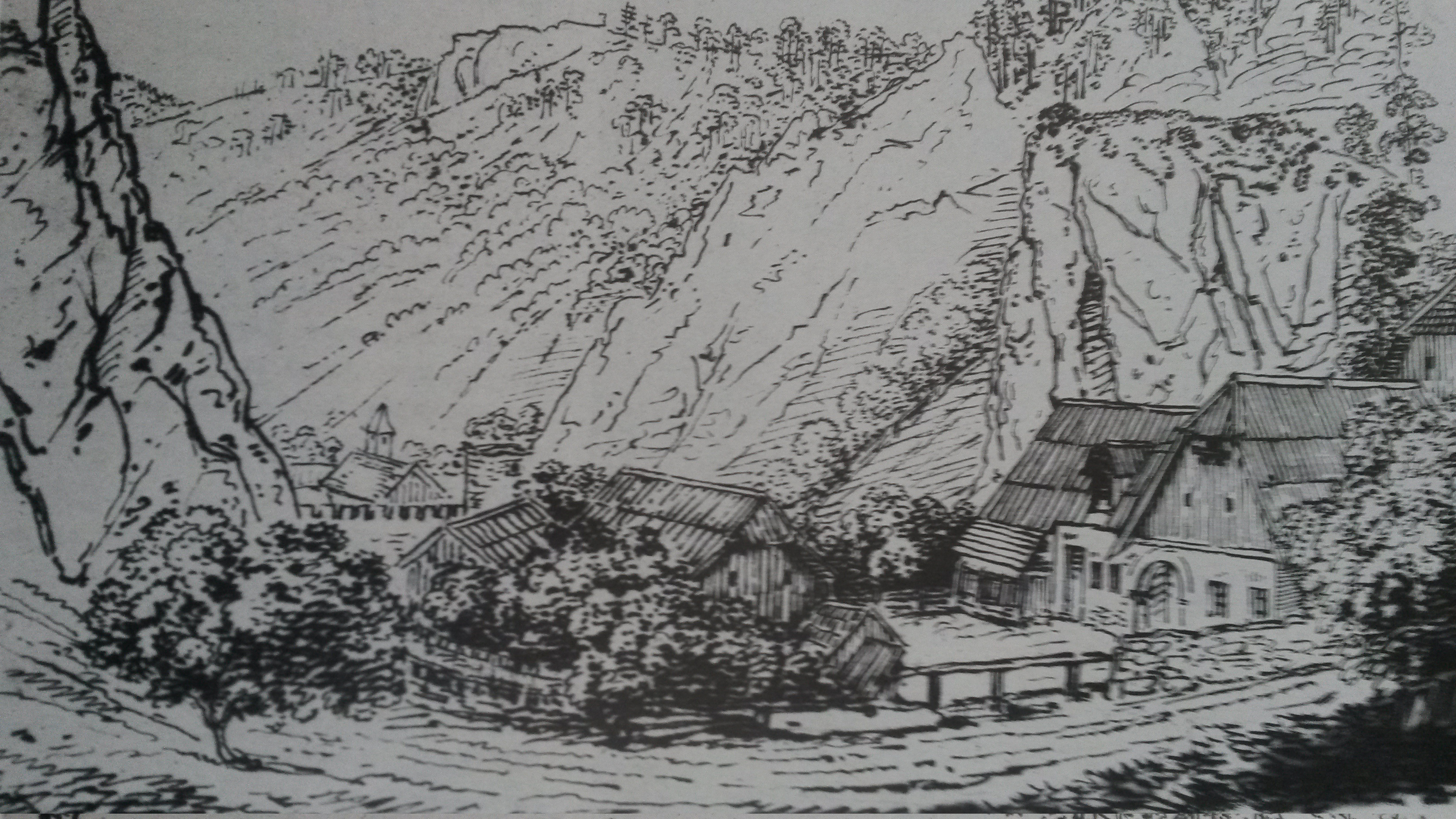 An der Semmeringstraße bei Schottwien. Braune Tuschfederzeichnung, bez. als "Bei Schottwien auf der Gränze von Österreich und Steiermark, den 23. Juny 1803 im Regen gez.", Blatt 13,1 x 22,1 cm.